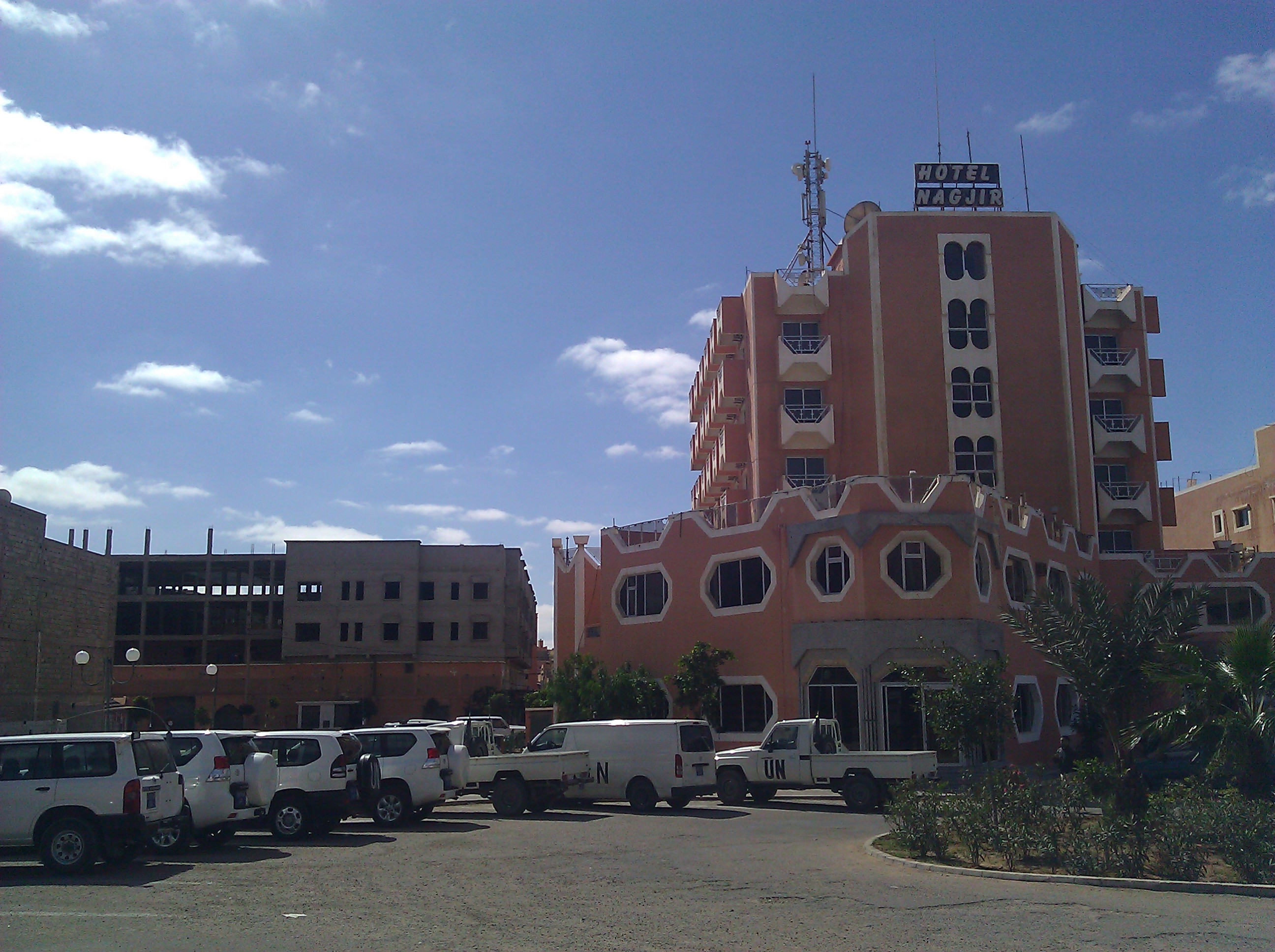 Laayoune, Morocco